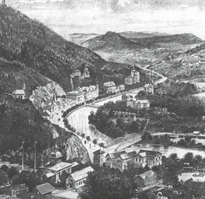 Kyselka